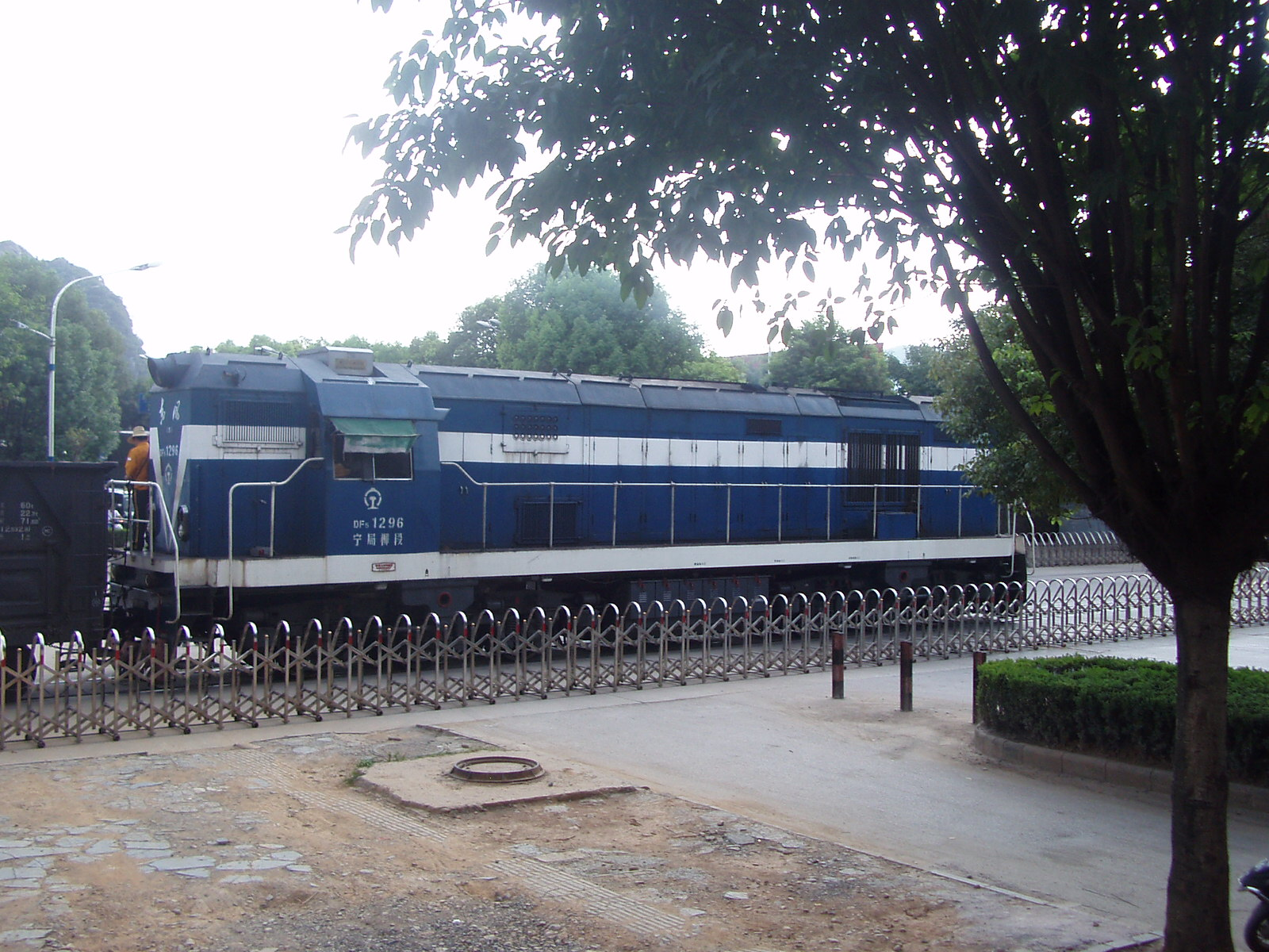 DF5型1296号机车牵引货列经过桂林桂海铁路兴进嘉园铁路道口，进入桂林南站。